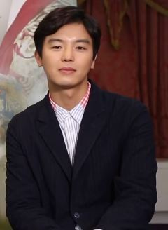 CNTV [7일의 왕비]